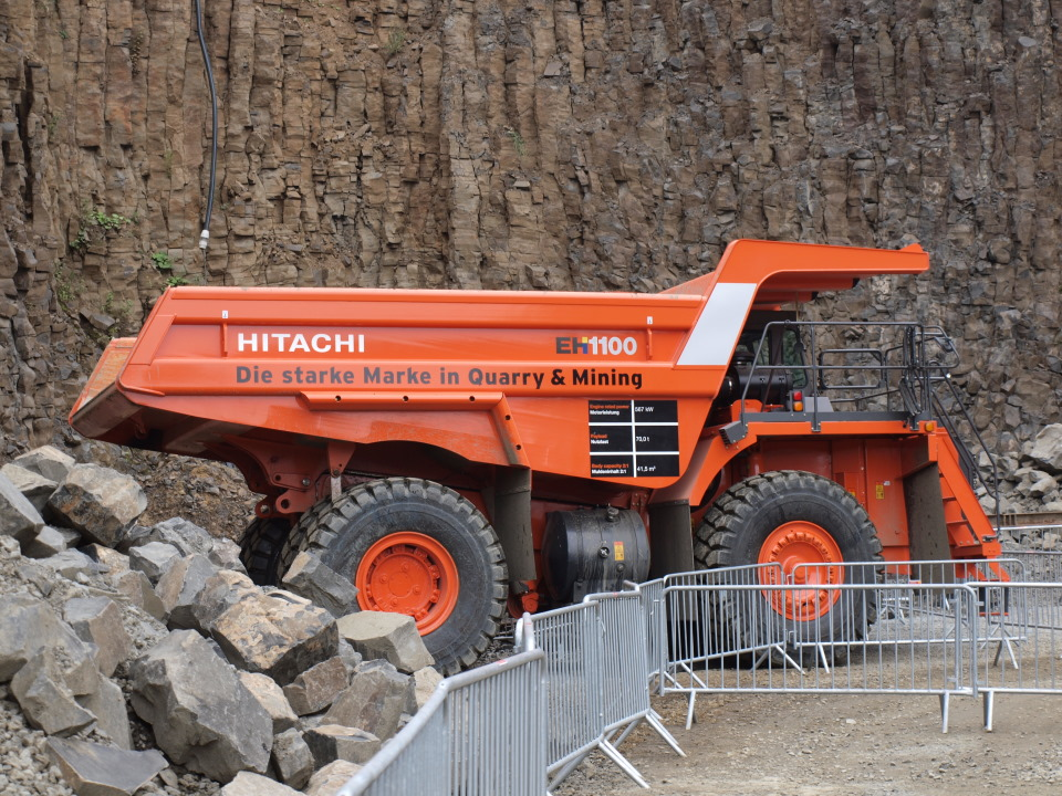 Hitachi-Starrrahmen-Muldenkipper Hitachi EH1100.